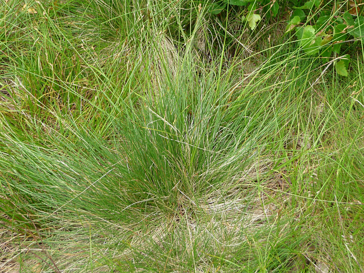 Borstgras bei Lindberg